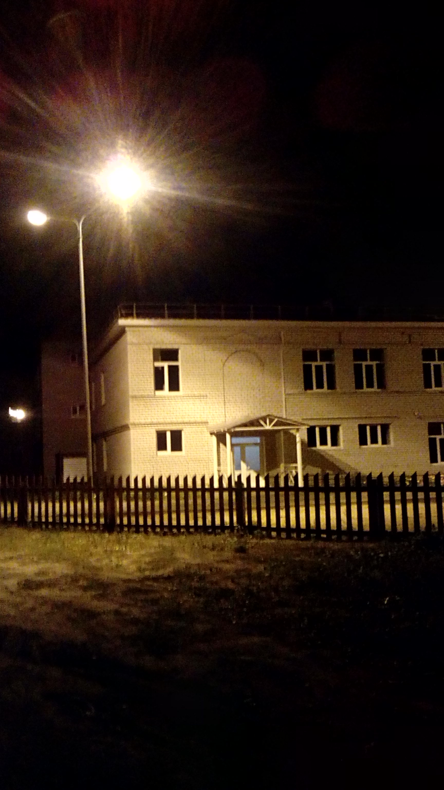 Вид на вход